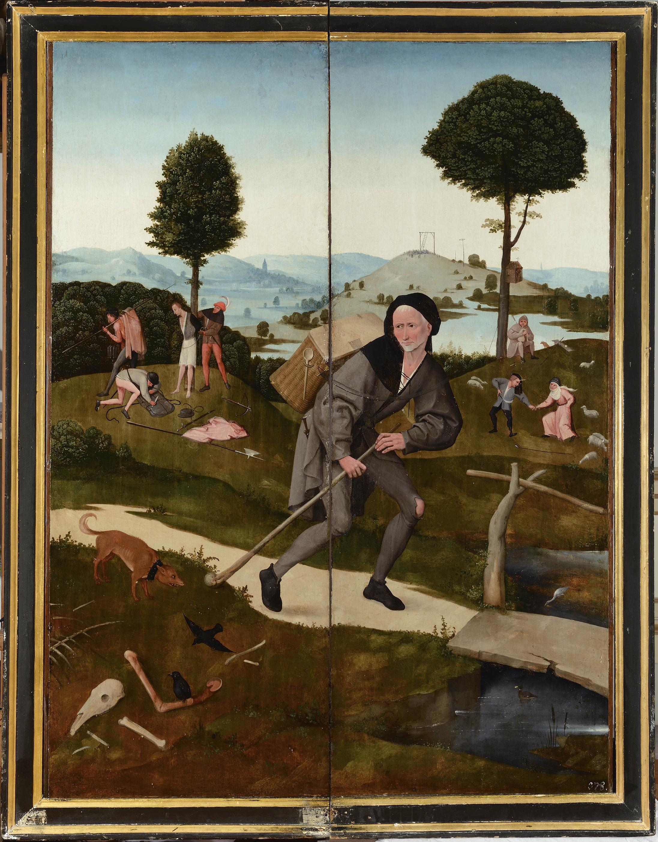 Revers du triptyque du Chariot de foin